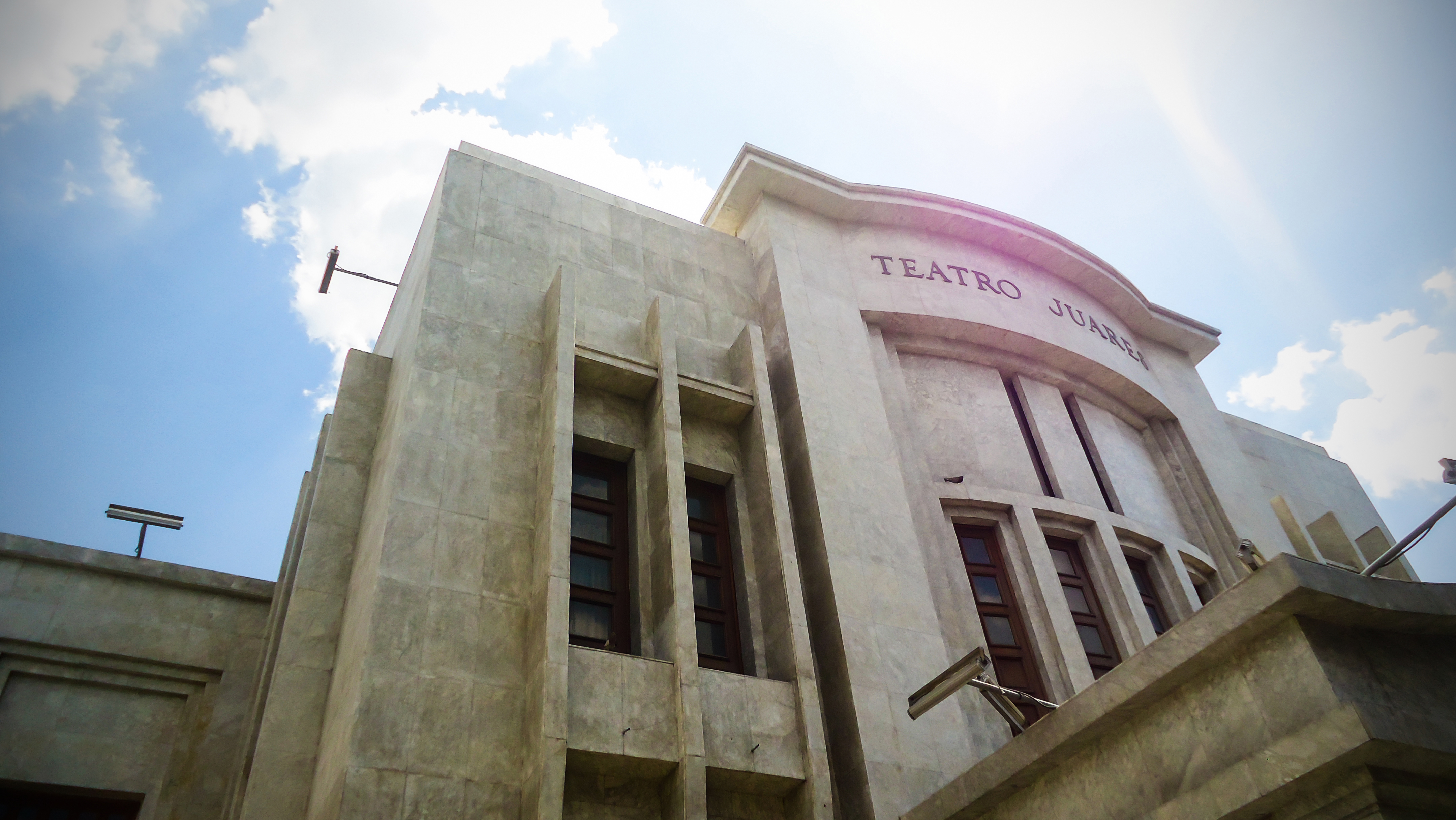 Teatro Juares, 2014